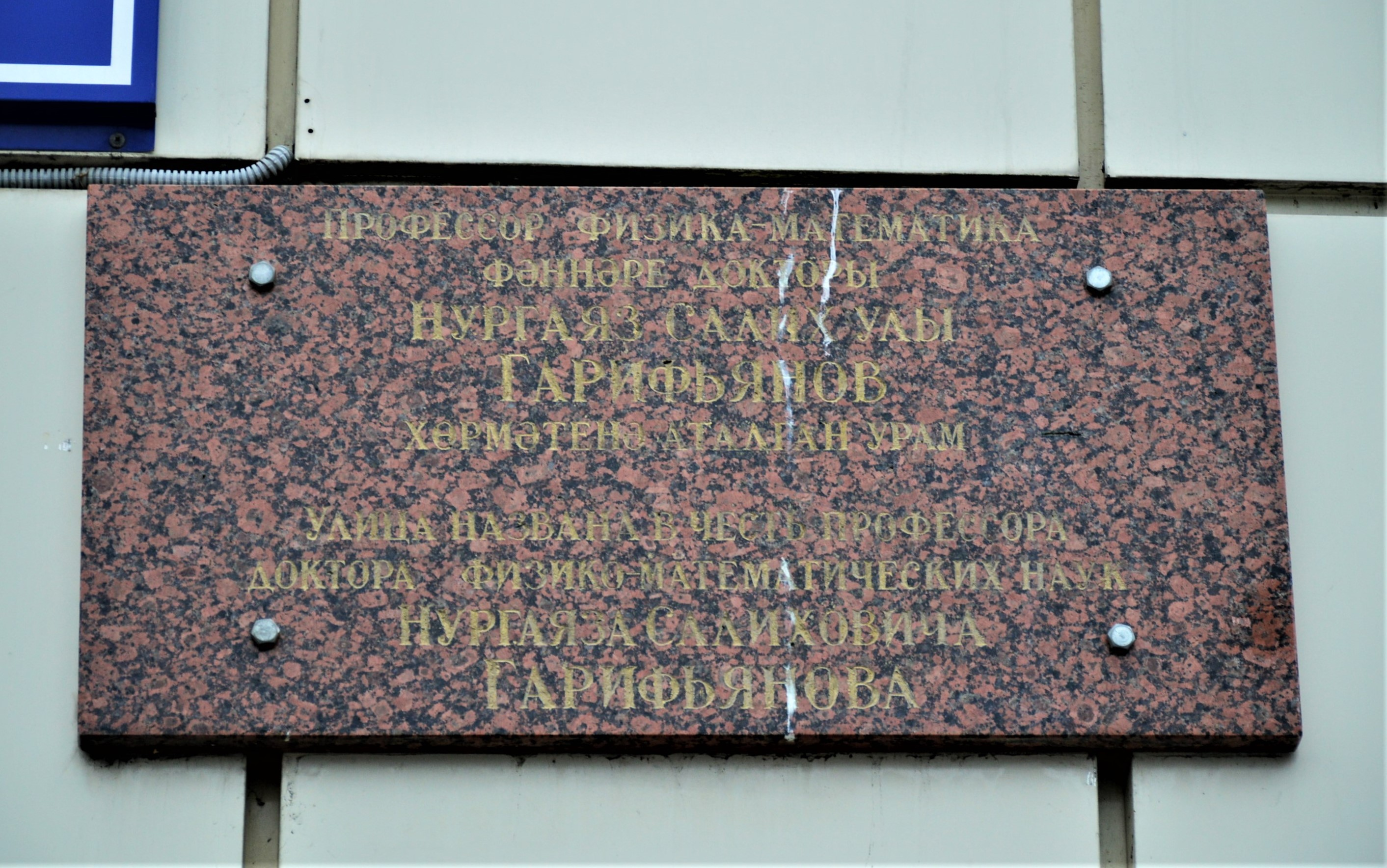 Казань, Горки. Памятная доска с указанием, в честь кого названа улица: ул. Гарифьянова, 2